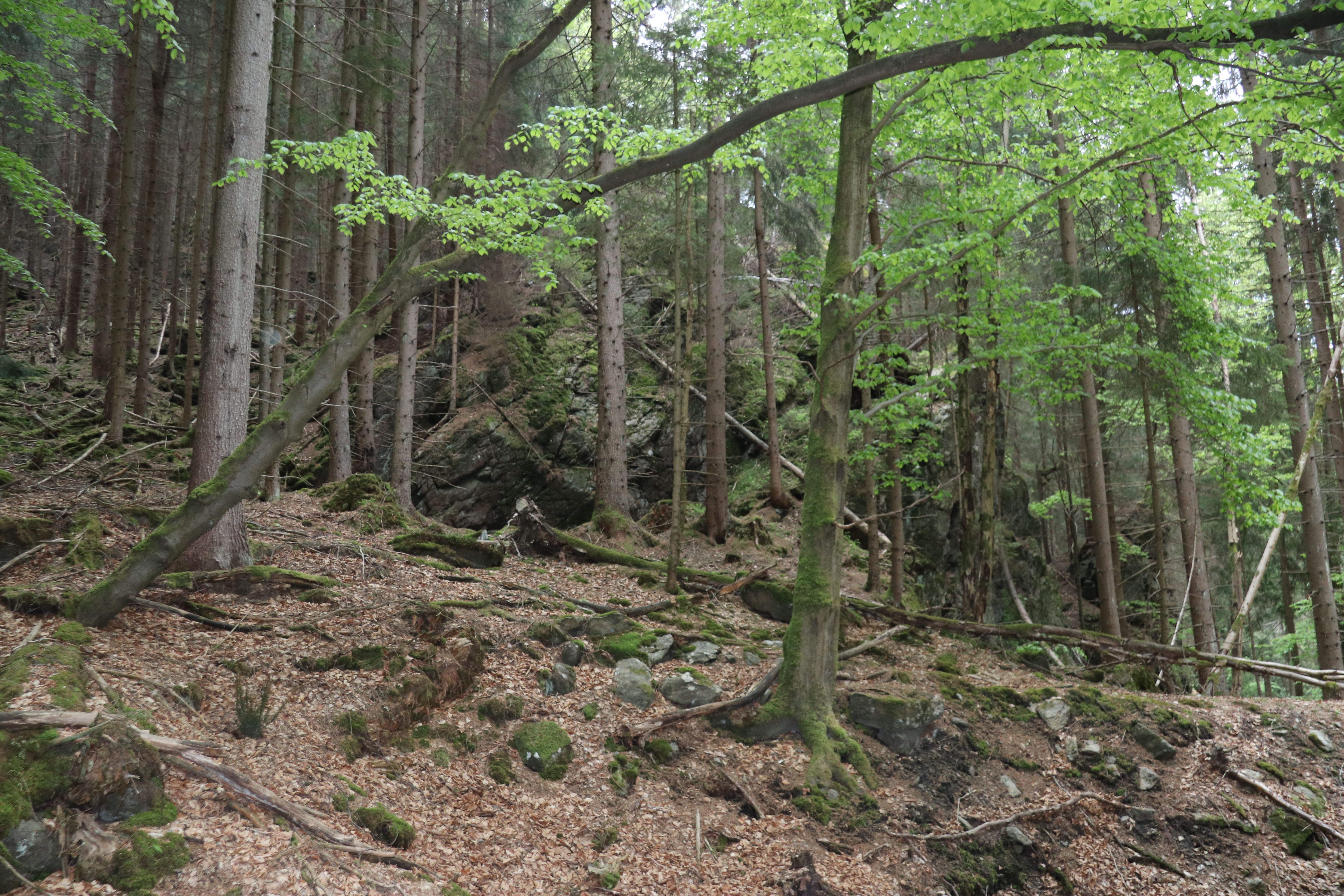 Im Naturschutzgebiet "Schieferbach" im Erzgebirgskreis